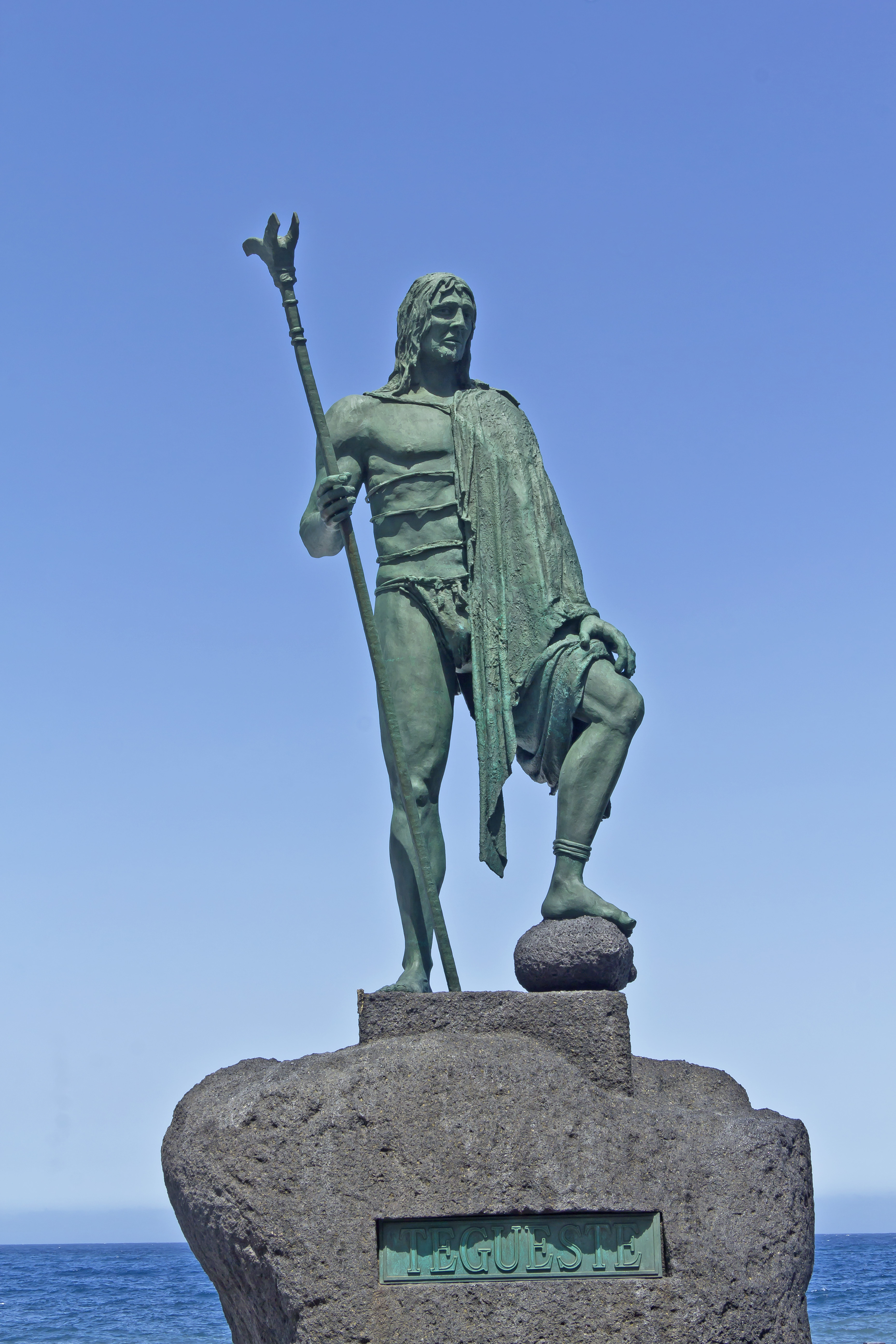 Die Plastik des Mencey Tegueste auf der Plaza de la Patrona de Canarias in Candelaria, Teneriffa, Spanien wurde von José Abad geschaffen